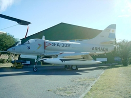 DOUGLAS A4-Q 0655/3-A-202